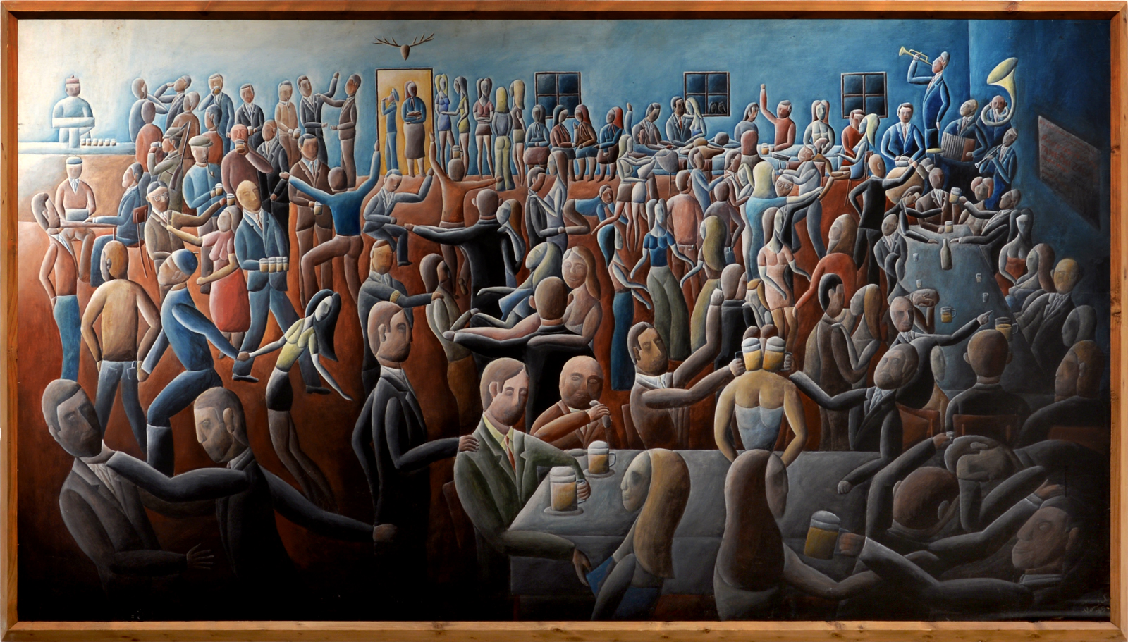 03. Bohumír Komínek, Posvícení, latex, tempera, překližka (1975)